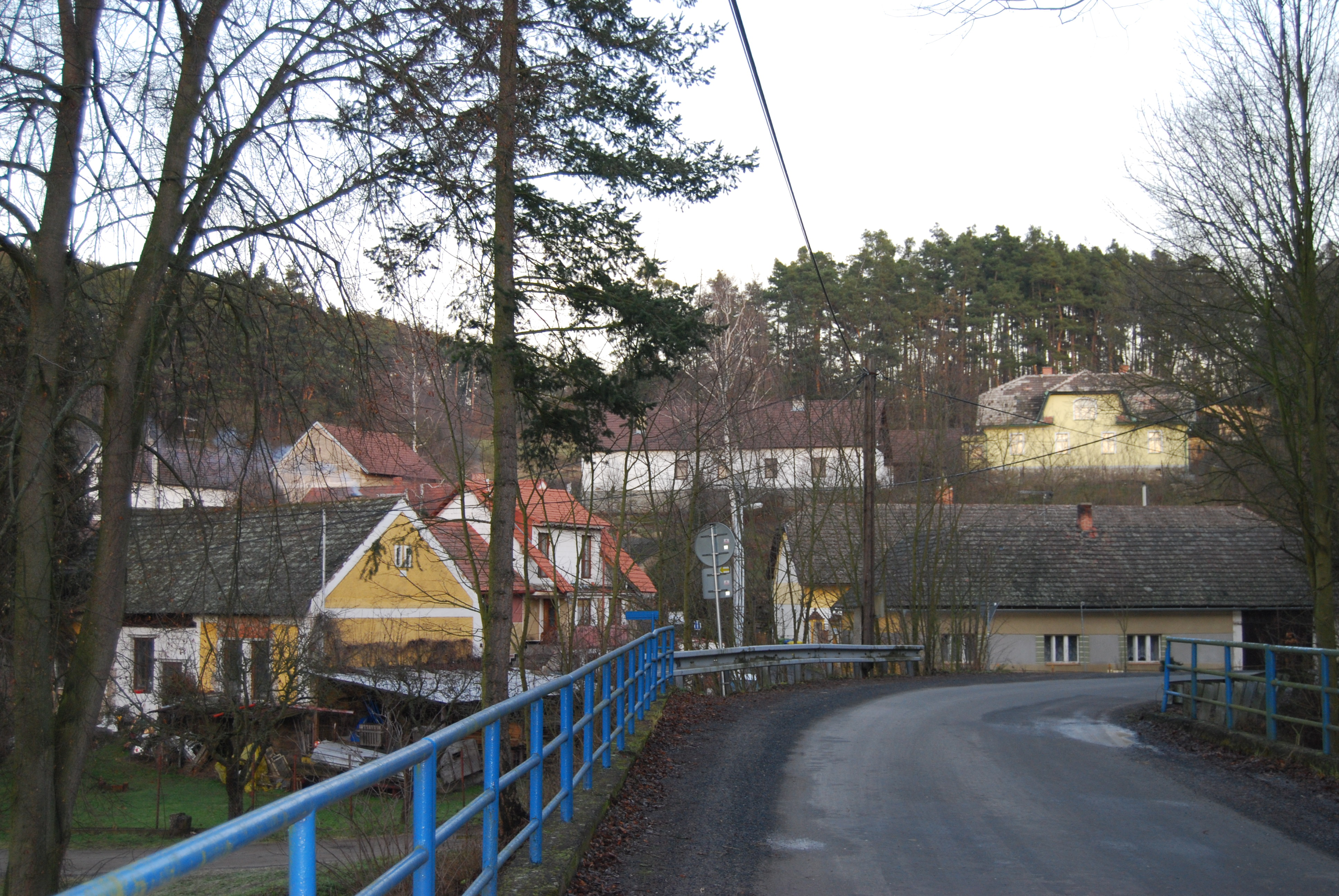 Pohled na vesnici, část mostu přes potok Brzina a komunikaci do vesnice. Brzina je část obce Svatý Jan v okrese Příbram. Česká republika.